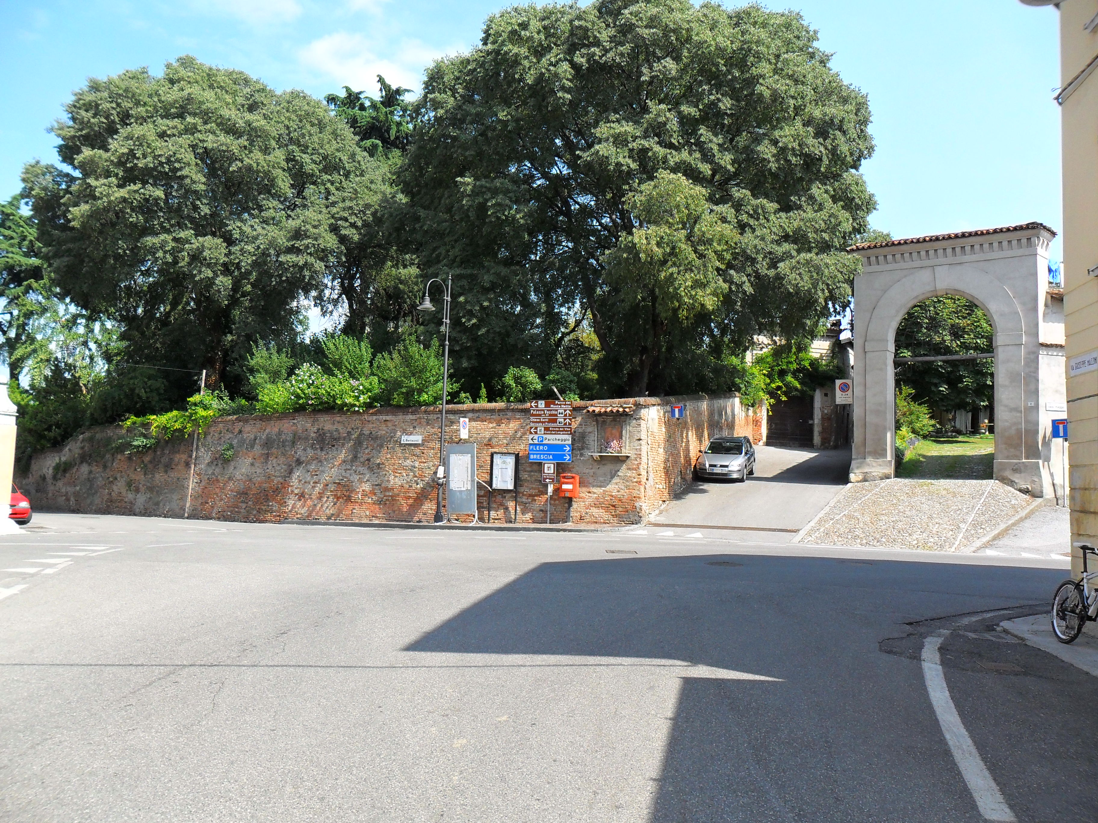 L'antica Piazza di Poncarale, attualmente incrocio tra via Piave, via Mazzini e via Bertazzoli. Sulla sinistra, parte della cinta muraria e palazzo Vecchia, sulla destra cortile Mazzola.